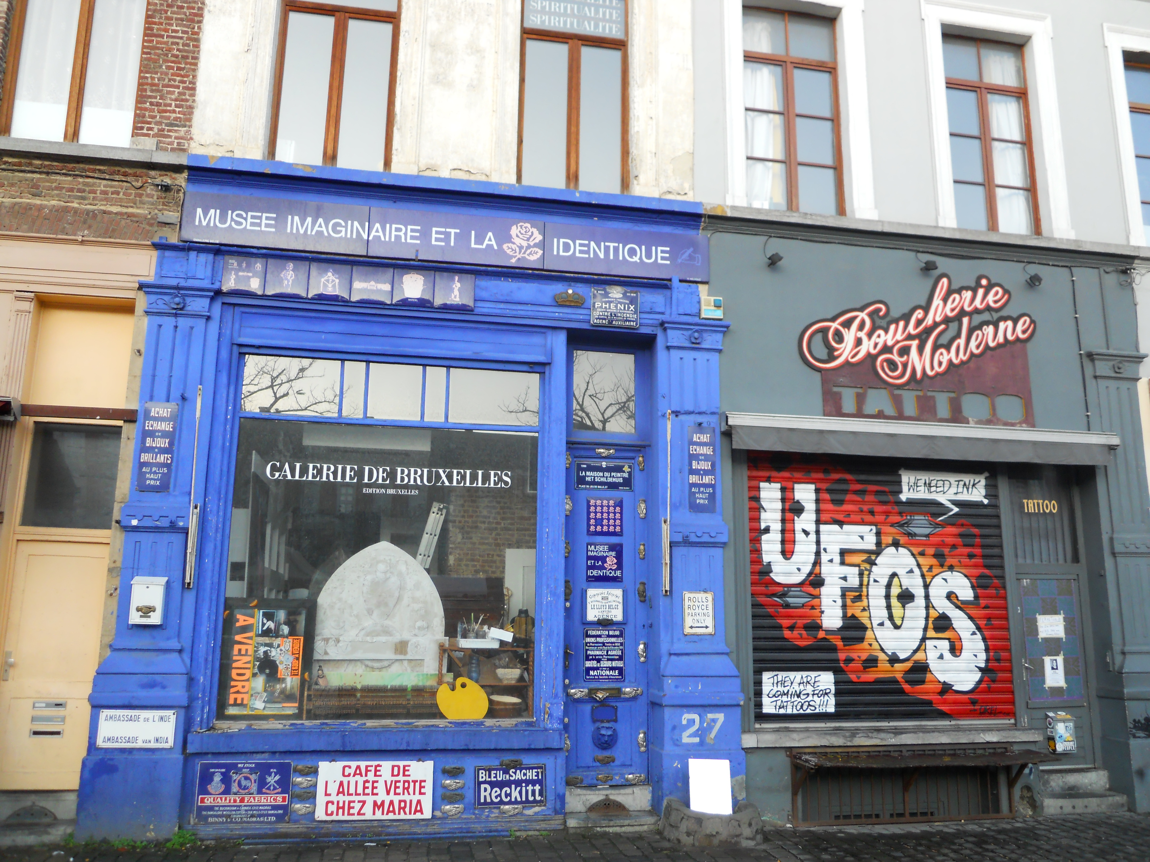 Negozi tipici sulla Piazza